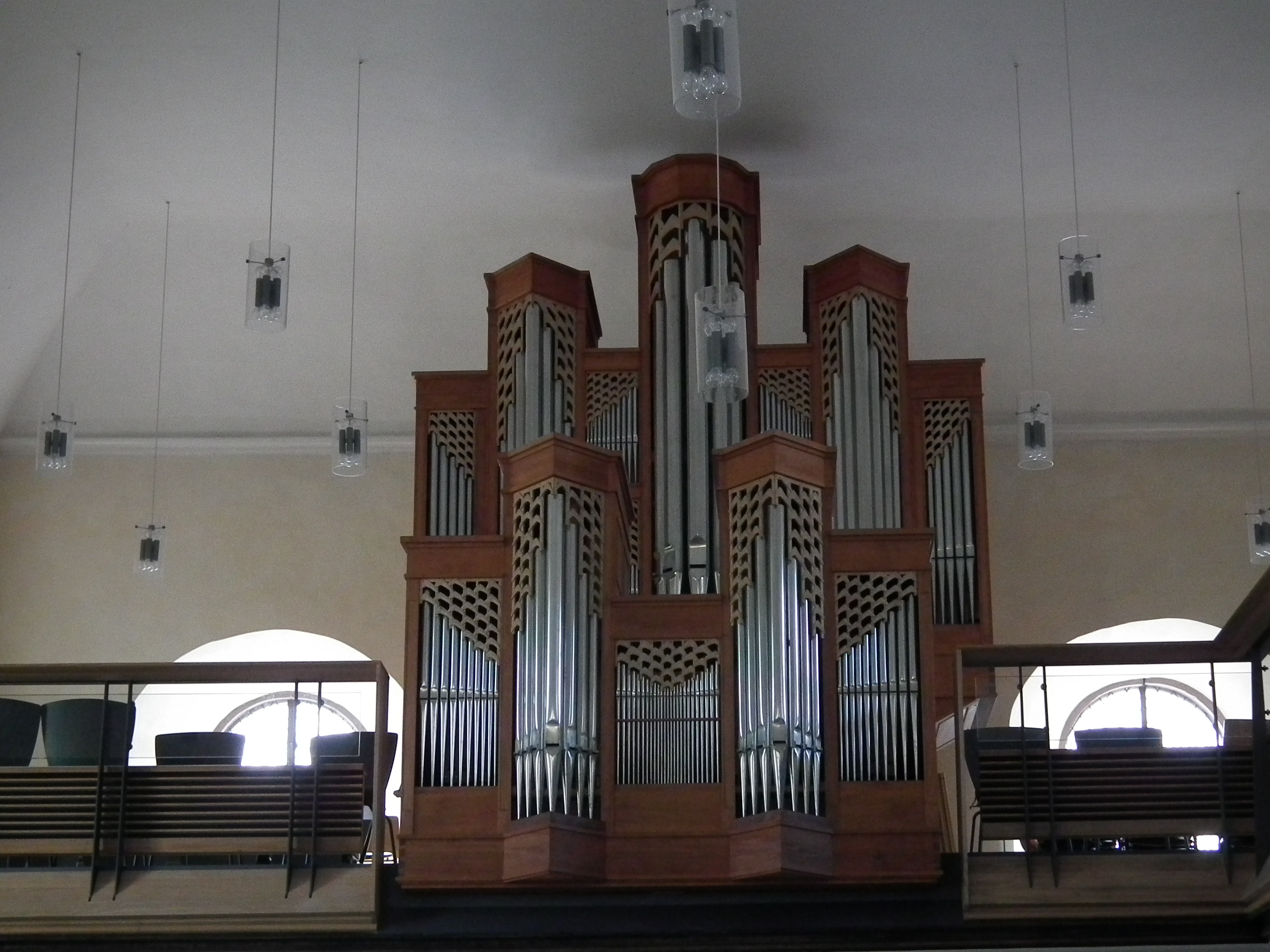 Orgel in der evangelischen Stadtkirche in Wiesloch (Baden-Württemberg, Deutschland). Orgel von Richard Rensch 1986.